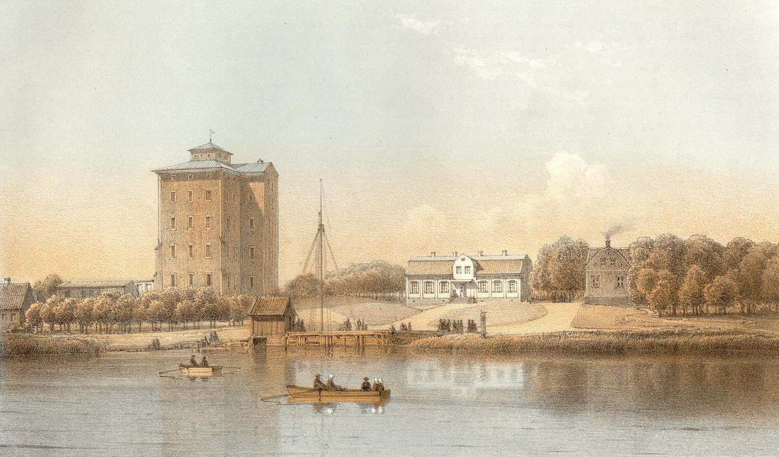 Tynnelsö slott kring 1869, Tryckt i Stockholm av Albert Bonniers förlag 1869. 57 taflor, tecknade efter naturen af Fr. Richardt. Planscherna är tryckta i tonlitografi och färglitografi. De tonlitograferade planscherna finns även handkolorerade.